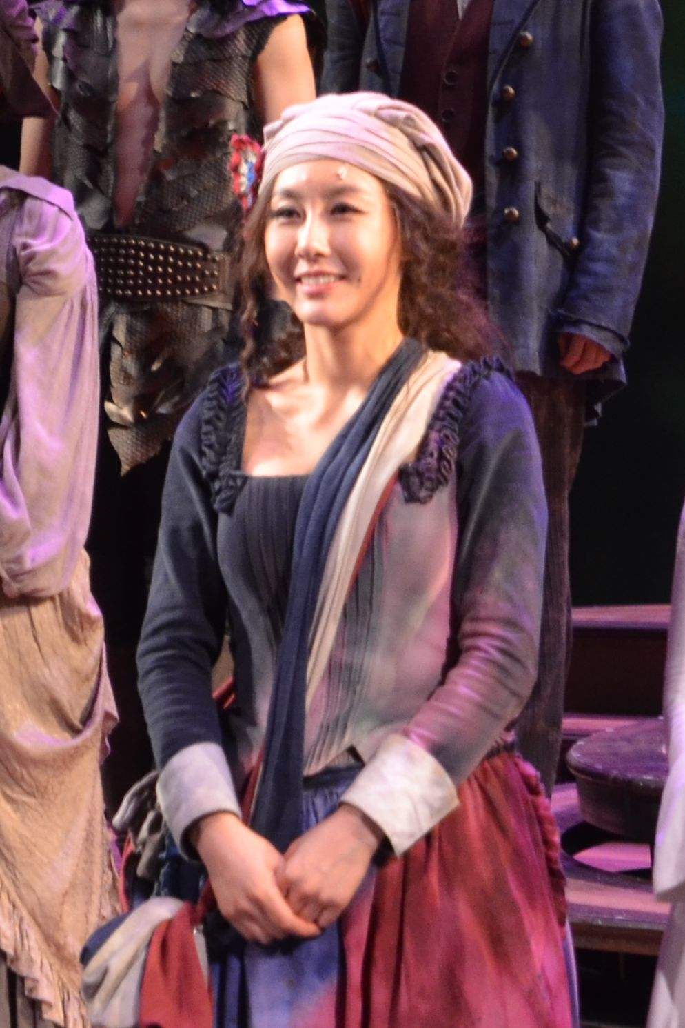 150208 마리앙투아네트 서울 막공 무대인사.